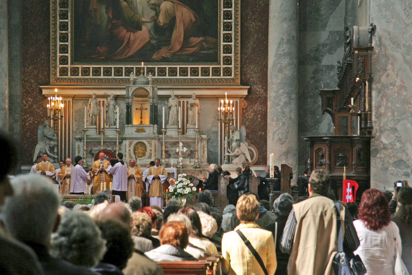 Főszékesegyház (Esztergom, Szent István tér) This is a photo of a monument in Hungary, Identifier: 6238